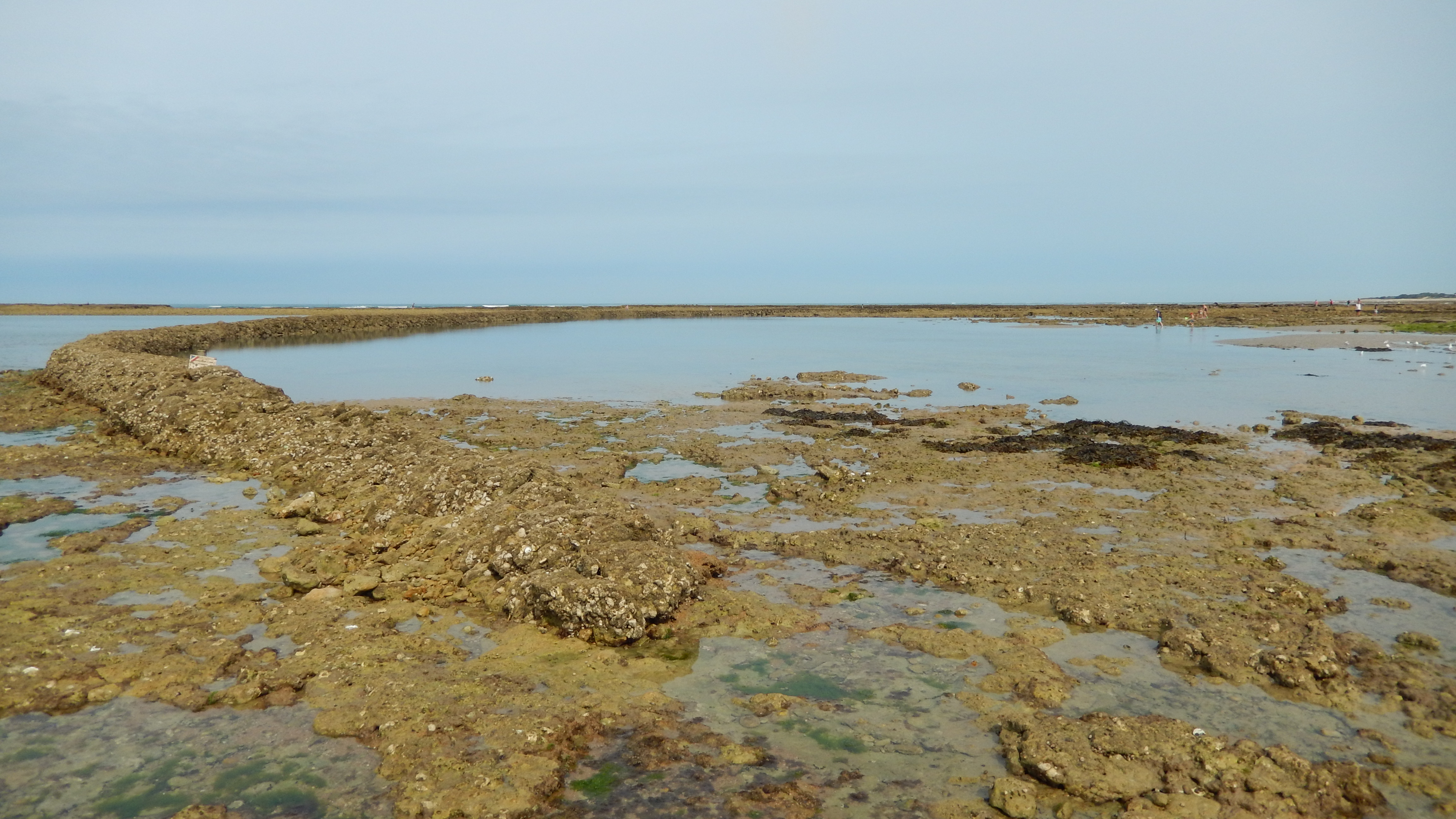 L'écluse à poissons de la Mal Bâtie, dans la commune de Saint-Georges-d'Oléron, au large du lieu-dit des Sables Vignier.